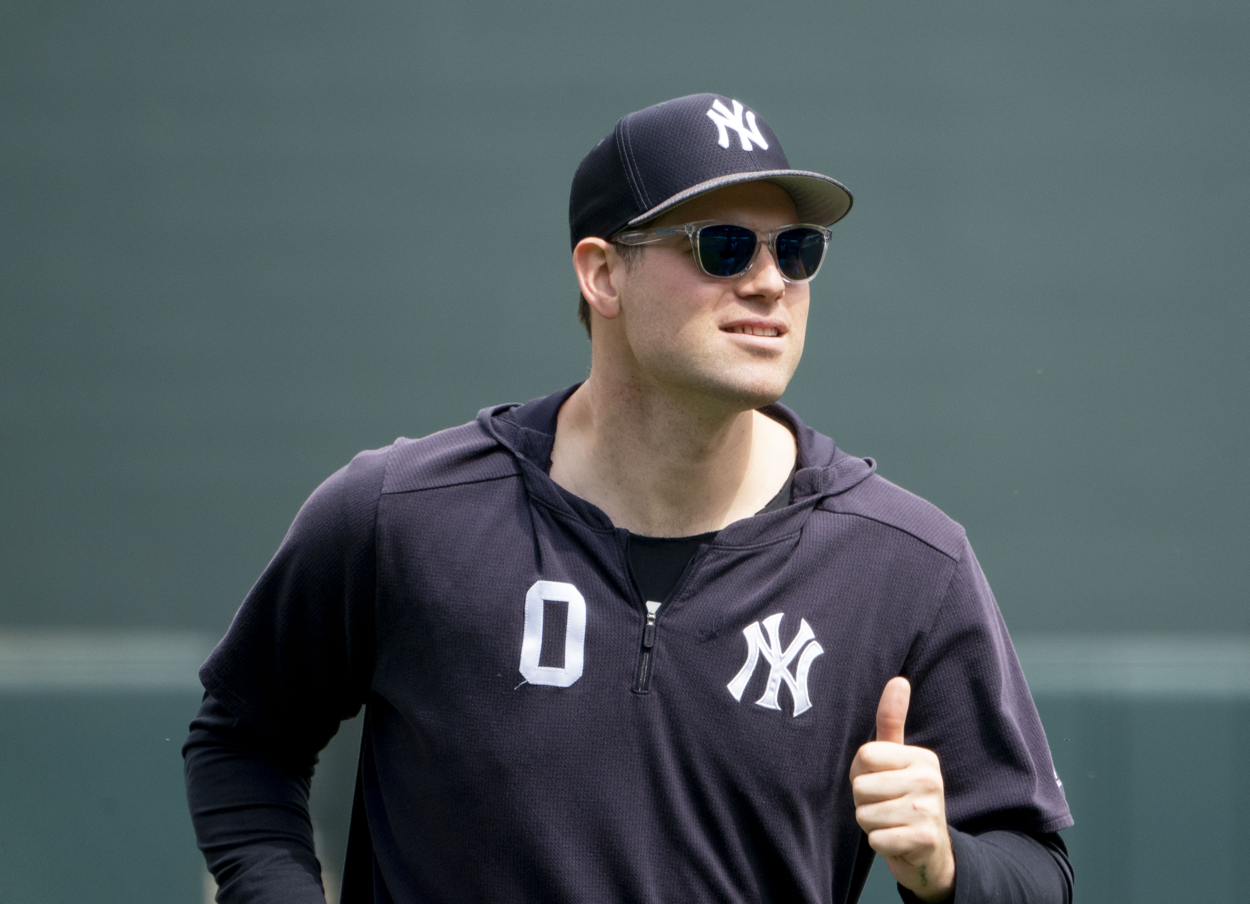 Yankees at Orioles 4/4/19